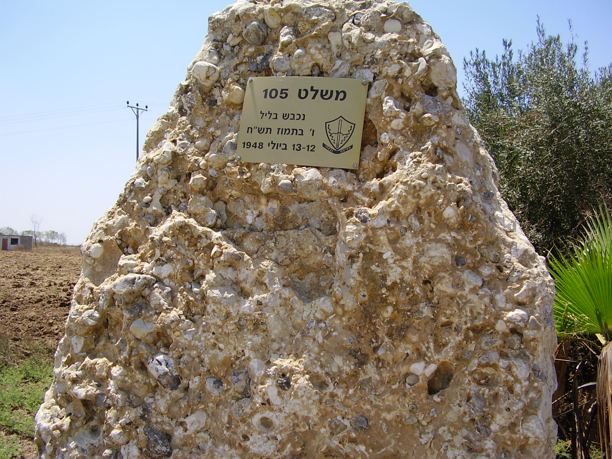 military memorial, negev, israel